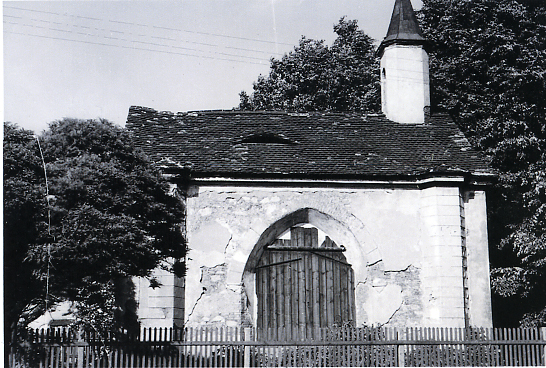 Kaple Navštívení Panny Marie v Lipětíně před svým zbořením.